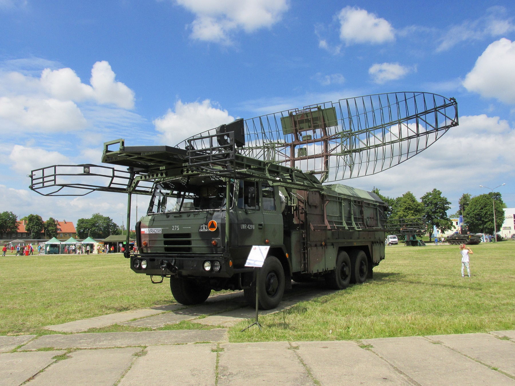 Stacja radiolokacyjna NUR-31 "Justyna" z 15 Pułku Przeciwlotniczego Gołdap